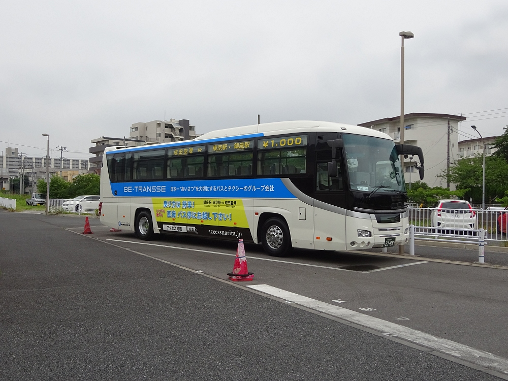 あすか交通の高速バス